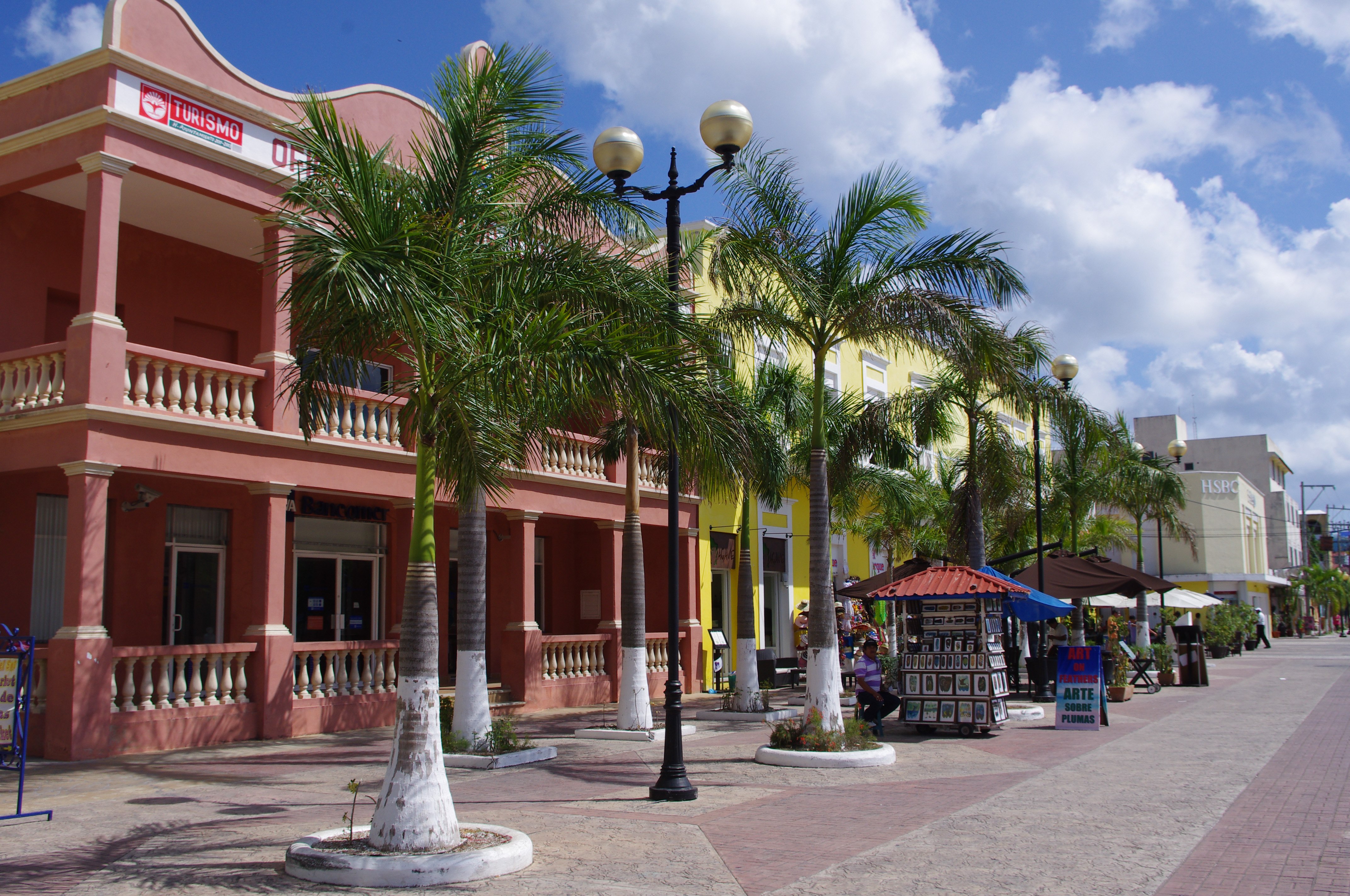 Plaza del Sol in Cozumel - architecture